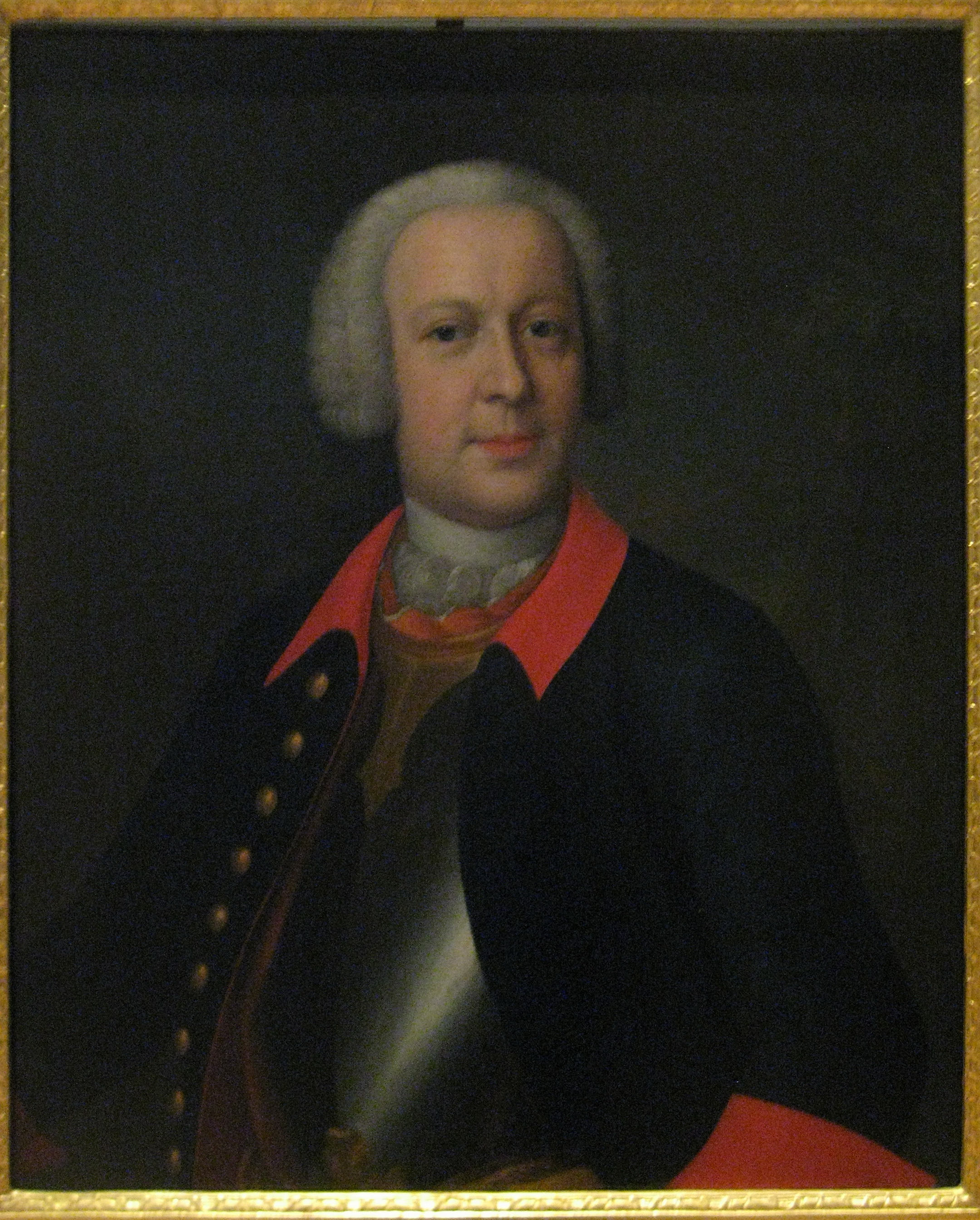 ПОртрет А.И. Гессен-Гомбургской